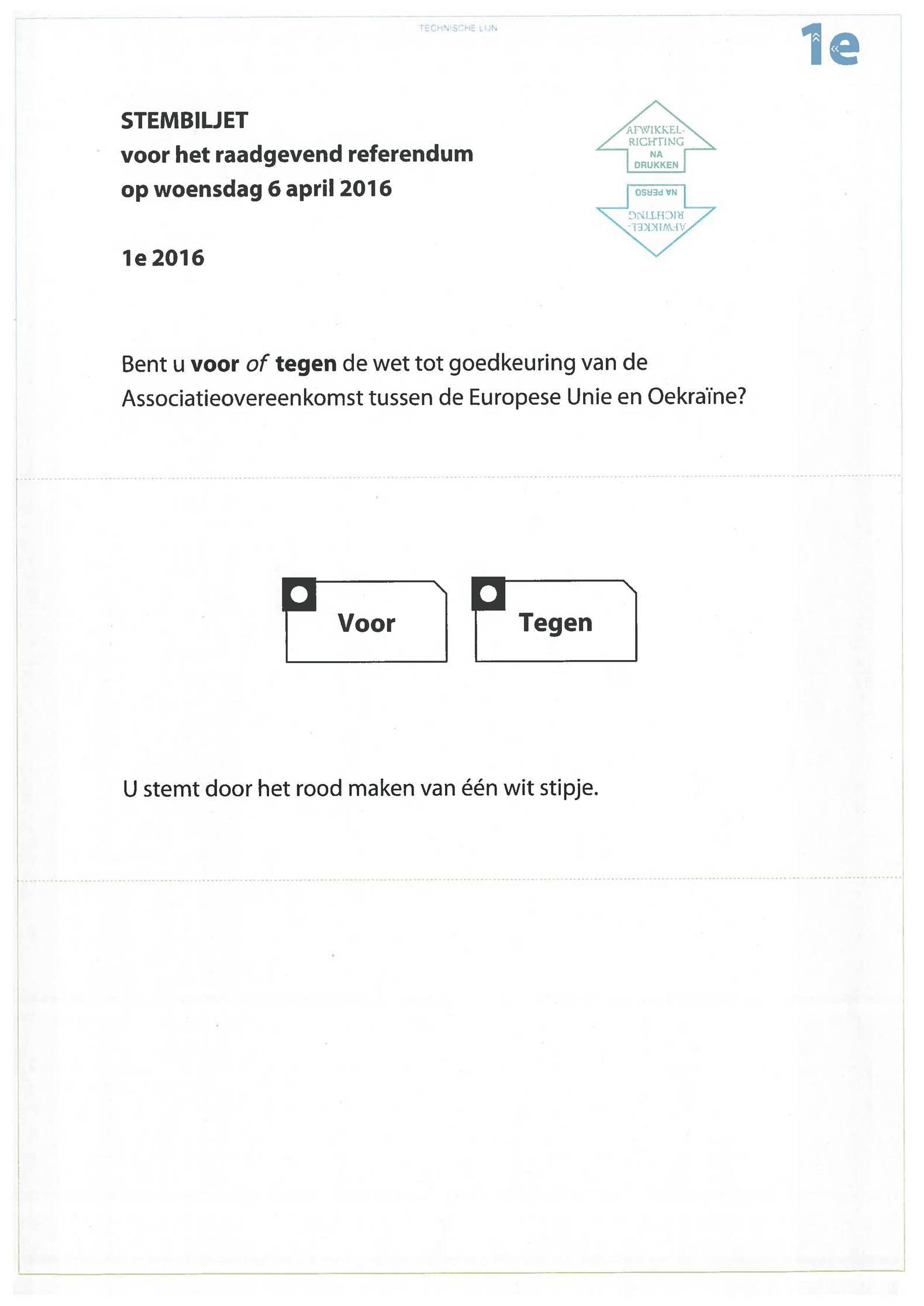 Wahlzettel (stembiljet) zum Referendum in den Niederlanden über das Assoziierungsabkommen zwischen der Europäischen Union und der Ukraine